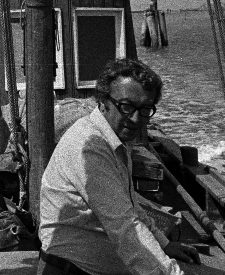 Valerio Riva nel 1975 nella laguna di Venezia